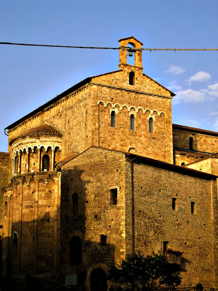 Anagni, Lazio, Italia